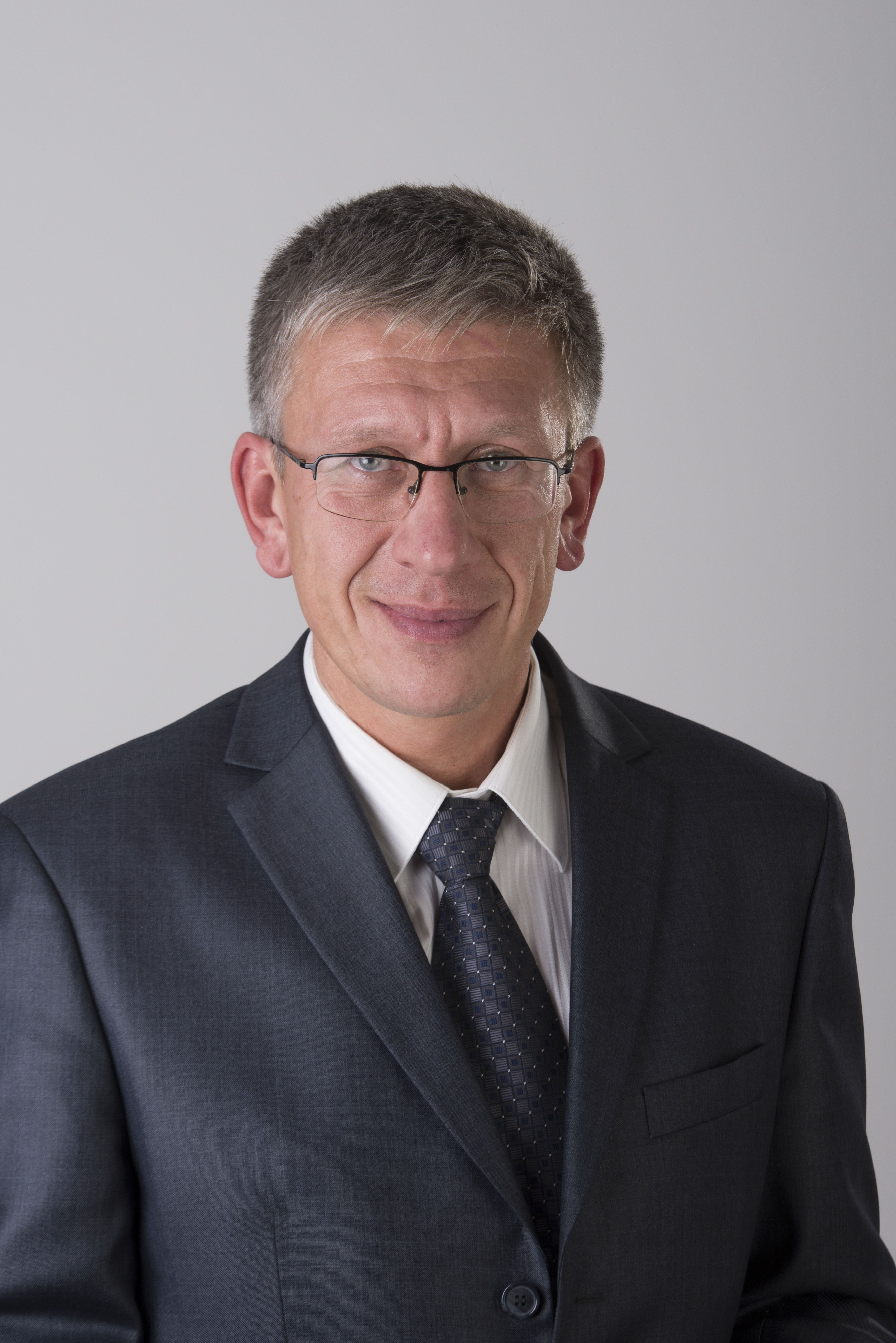 2014.gada 9.decembris. 12.Saeimas deputāts Andrejs Judins. Foto: Reinis Inkēns, Saeimas Kanceleja Izmantošanas noteikumi: saeima.lv/lv/autortiesibas